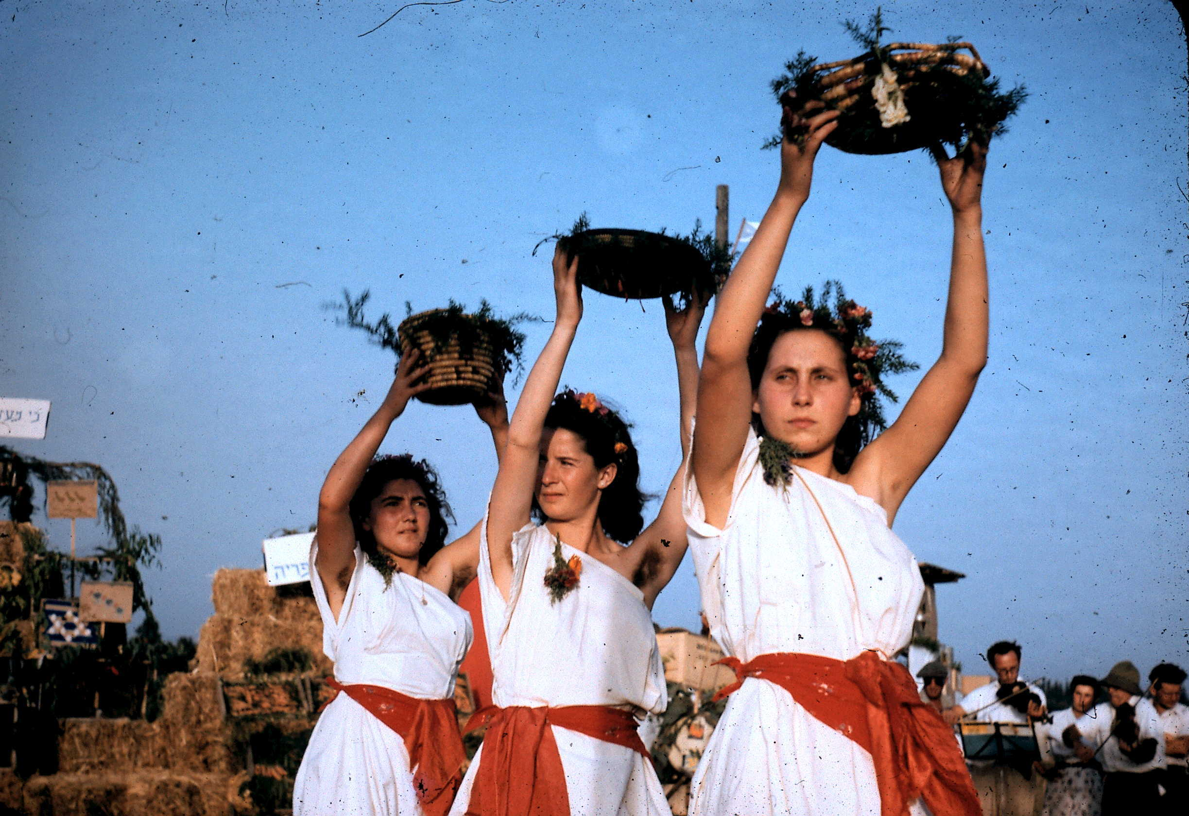 נערות רוקדות בטקס הבאת הביכורים בשנת 1951 בקיבוץ גבעת חיים מאוחד, Original Image Name:ריקוד שבועות, Location:גבעת חיים מאוחד. התמונה נסרקה מתוך אוסף שקופיות צבעוניות שנמצא לאחר מותו של הצלם.